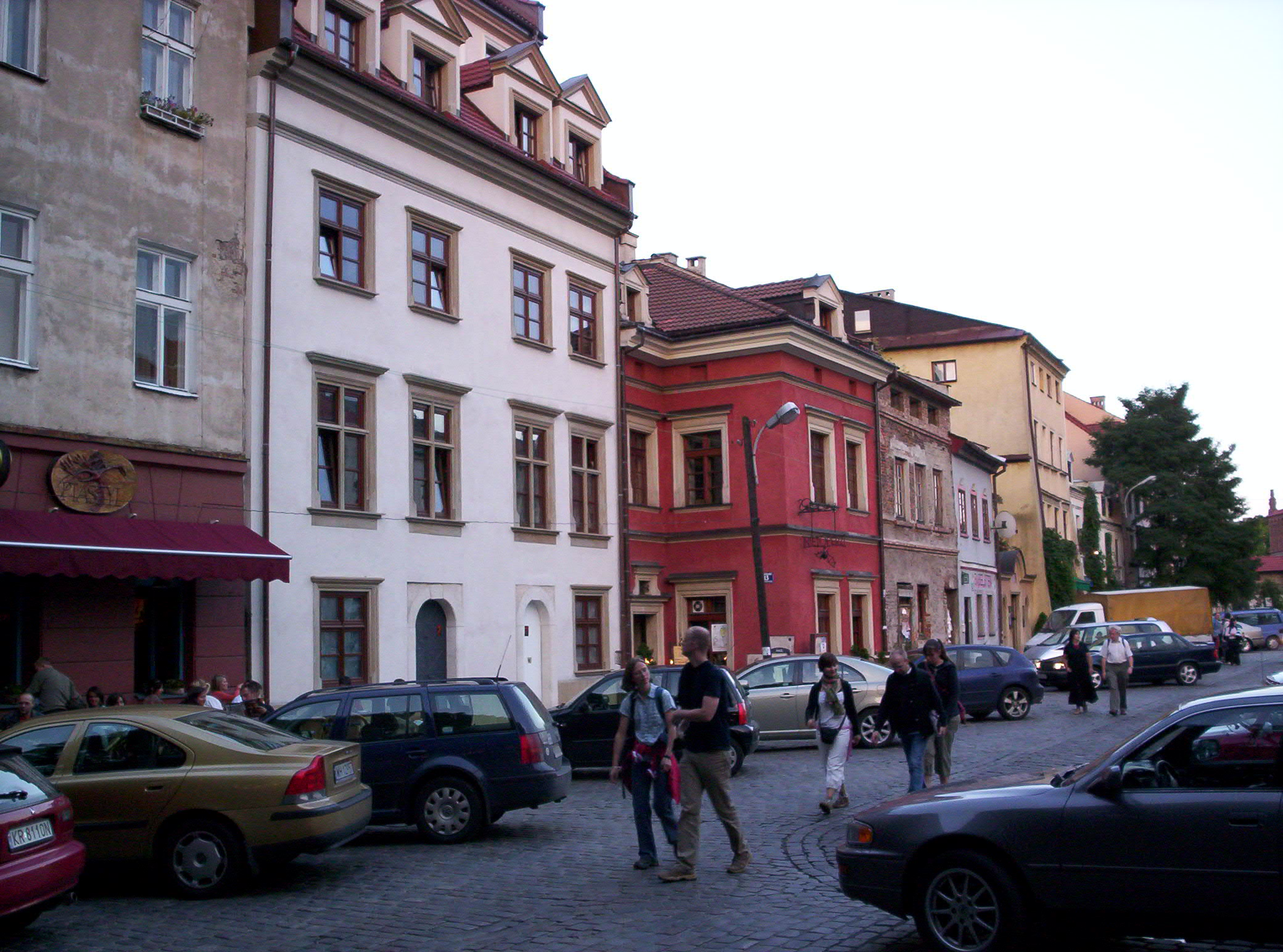 Widok na dzielnicę Żydowską, Krakowski Kazimiesz / View of Jewish district Krakow Kazimierz